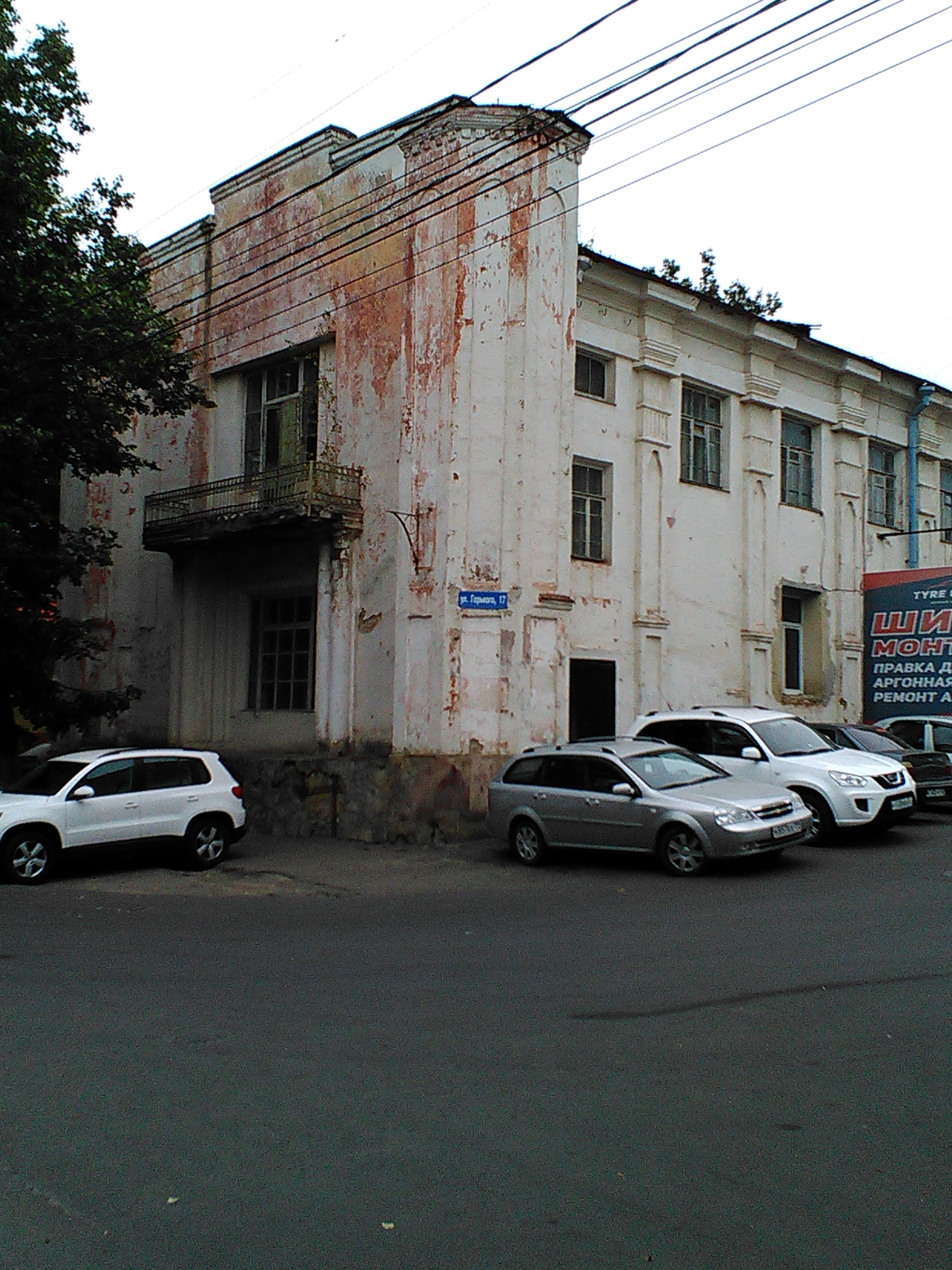 Здание бывшей церкви во имя Непорочного Зачатия Пресвятой Девы Марии — костёл